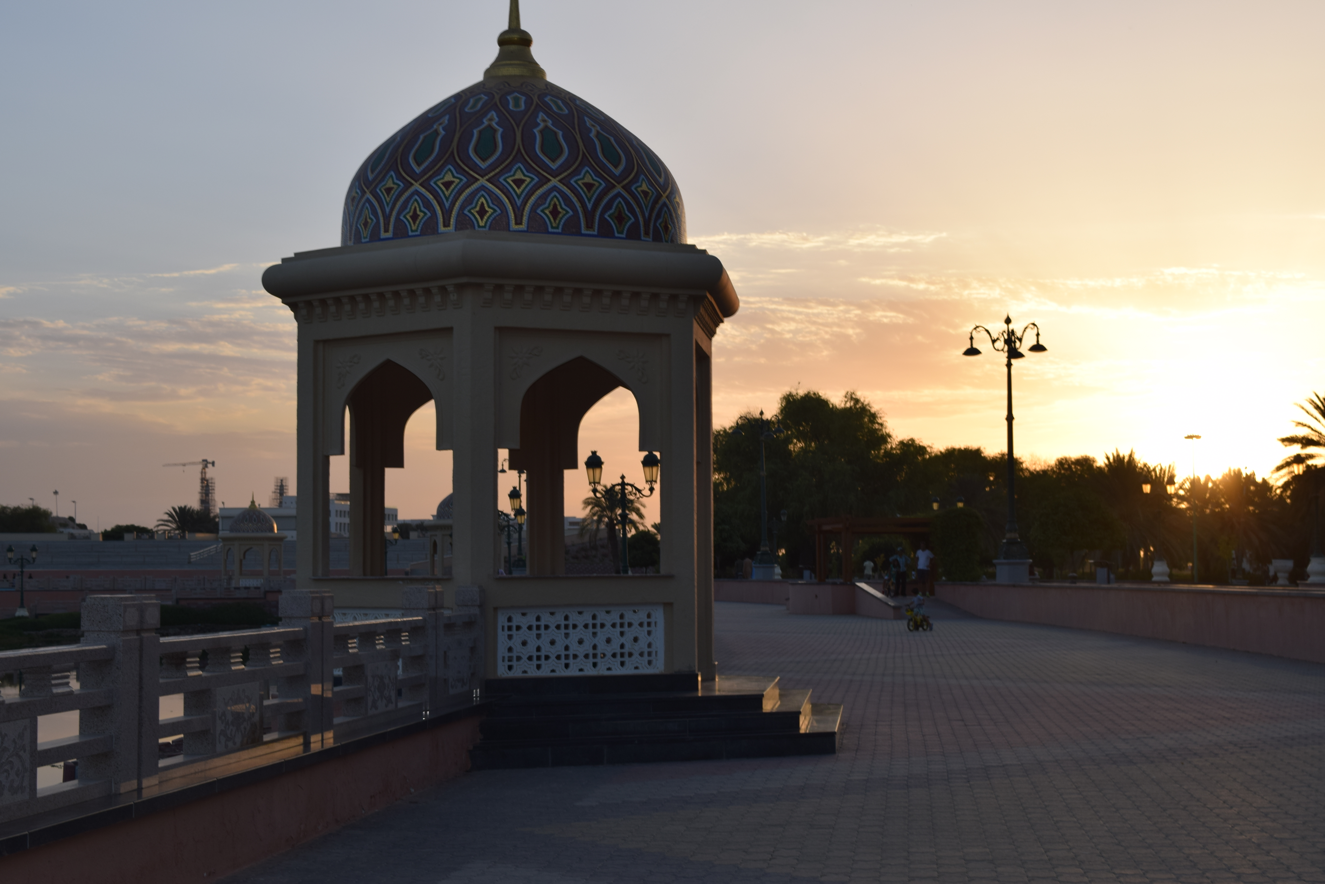 صورة لحديقة القرم الطبيعية عند الغروب.